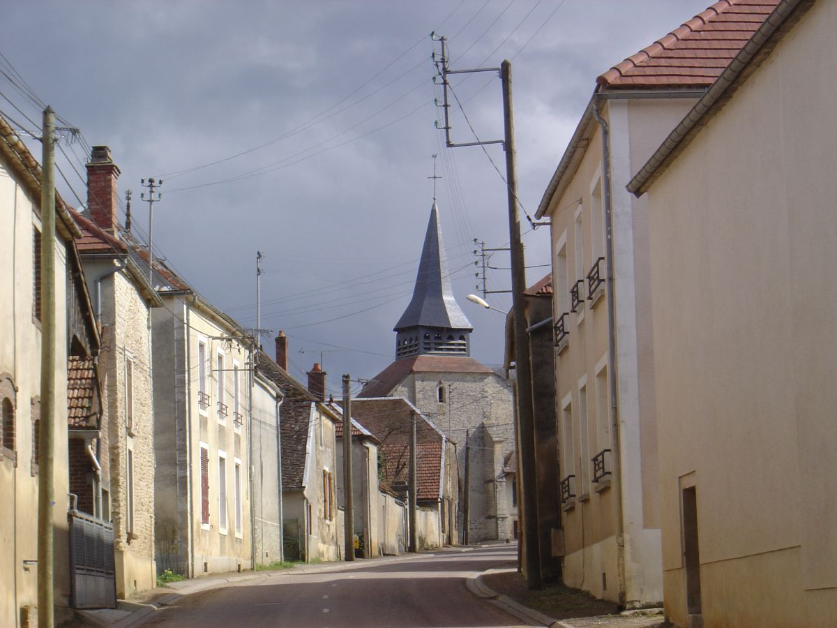 La rue Principale de Longpré-le-Sec